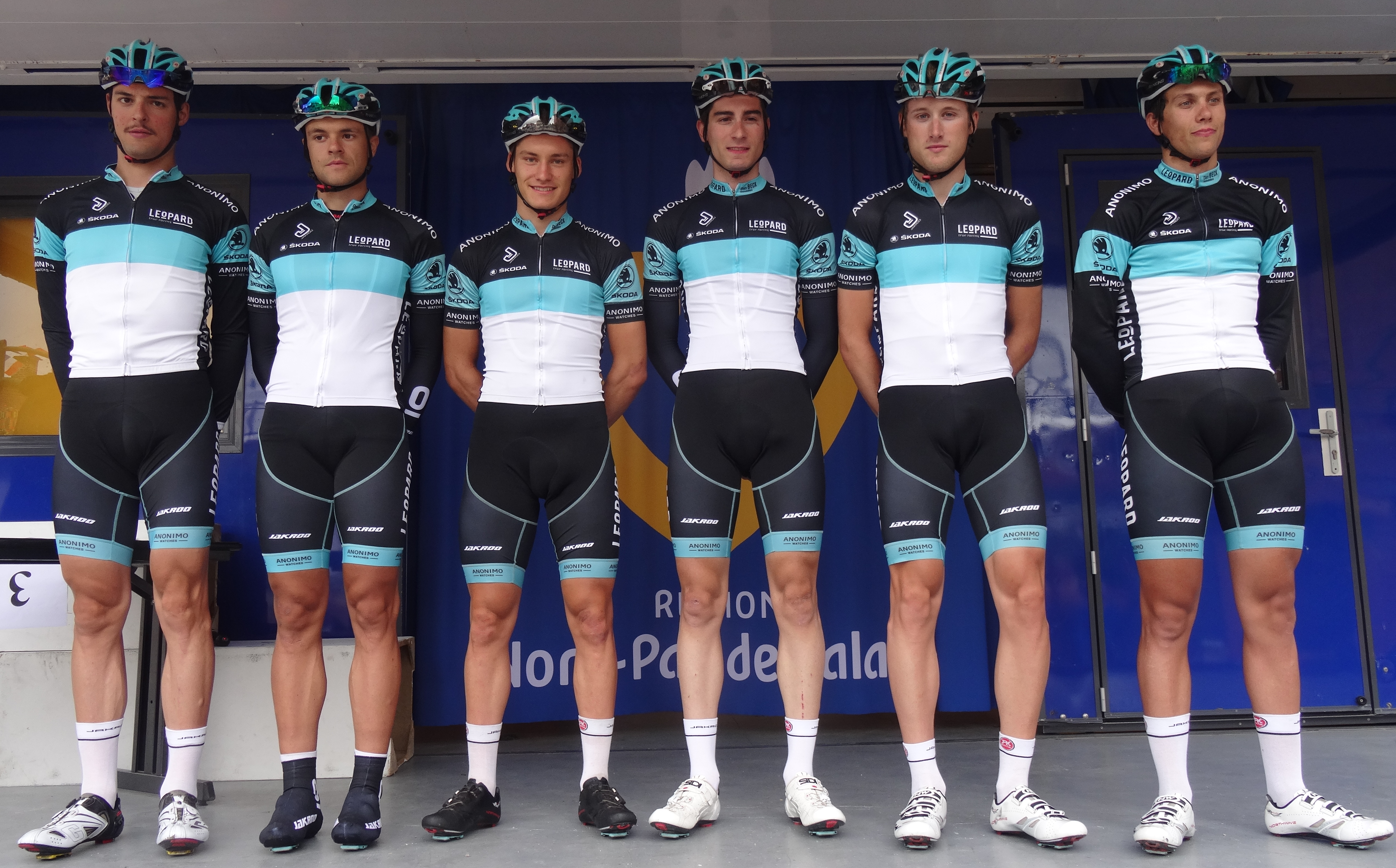 Reportage photographique réalisé le dimanche 13 juillet à l'occasion du départ et de l'arrivée de la Ronde pévéloise 2014 à Pont-à-Marcq, Nord-Pas-de-Calais, France.